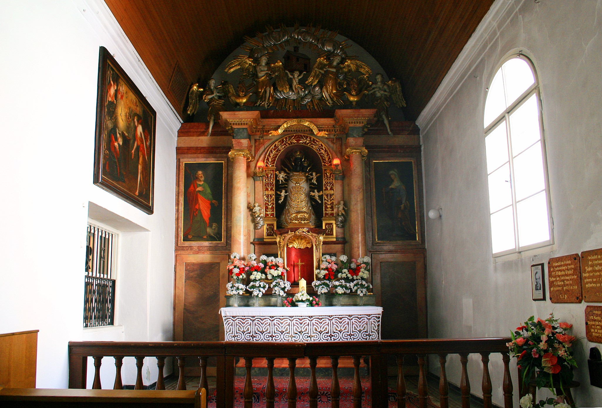 Loretokirche